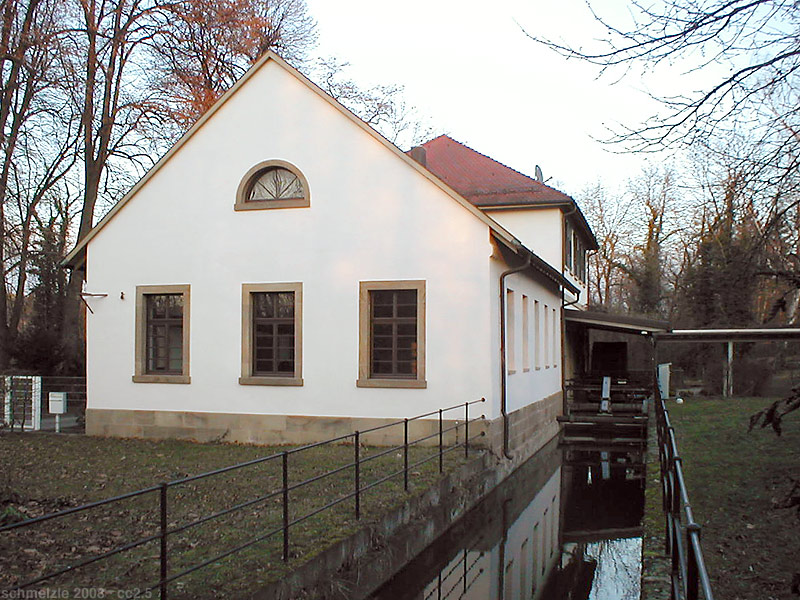 Historisches Pumpwerk in Heilbronn-Neckargartach